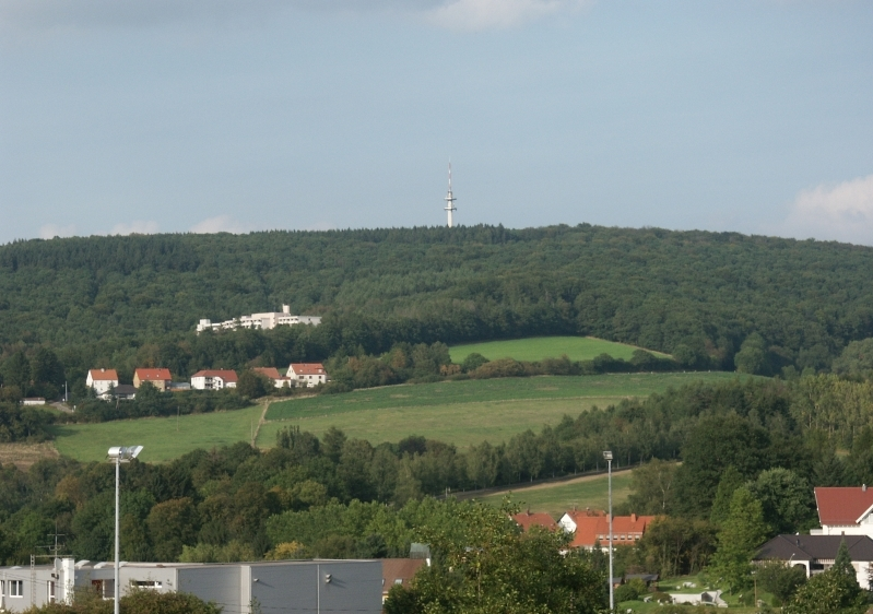 Bosenberg, St. Wendel